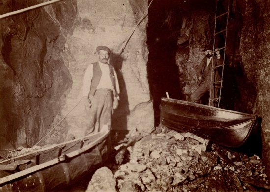 L'embarcadère, au fond du puits, à -57 m. Louis Armand est à gauche, derrière l'Osgood, et Clément Drioton est à droite, derrière le Berthon. (